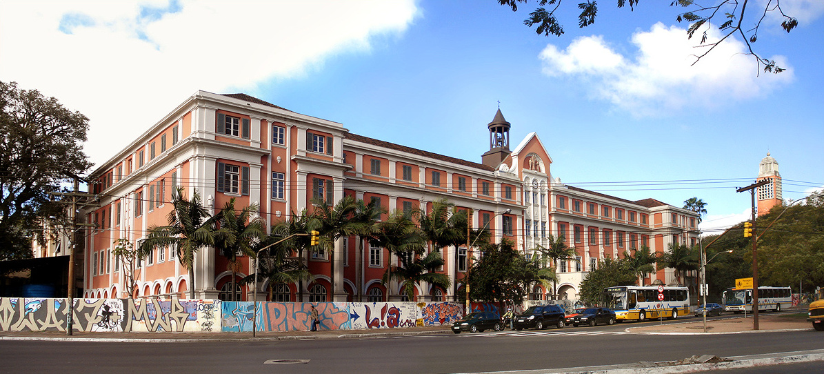 Fundação O Pão dos Pobres de Santo Antonio, Porto Alegre, Brasil.